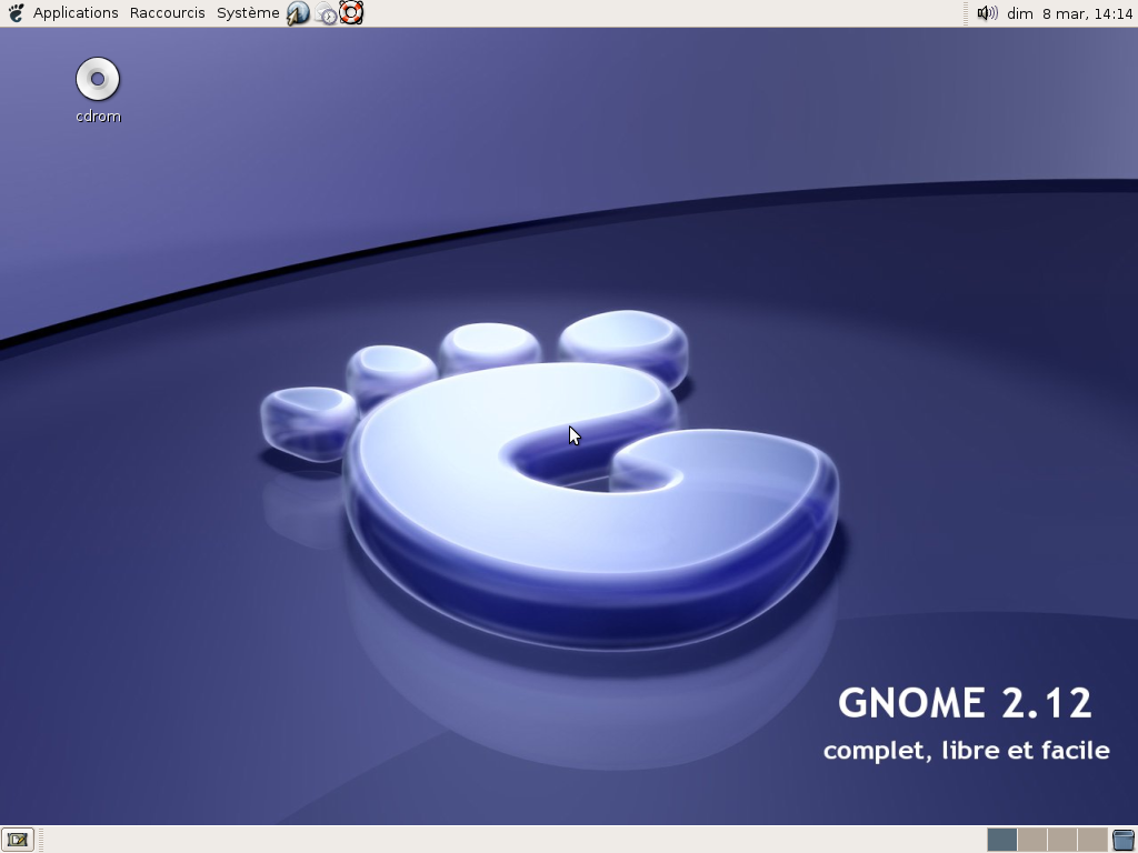 Premier écrans après démarrage sur le CD